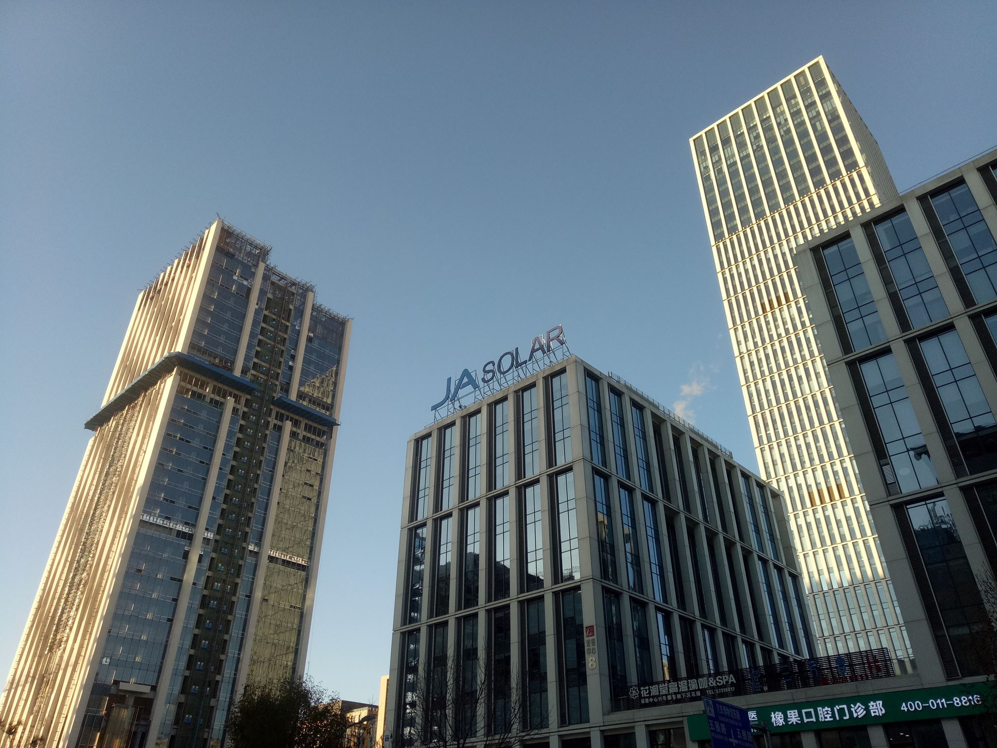 北京諾德中心位於中華人民共和國北京市豐台區豐台科技園，由中國中鐵旗下中鐵建工集團開發建設，總建築面積約45萬平米，內有寫字樓、購物中心、會議中心、酒店等設施